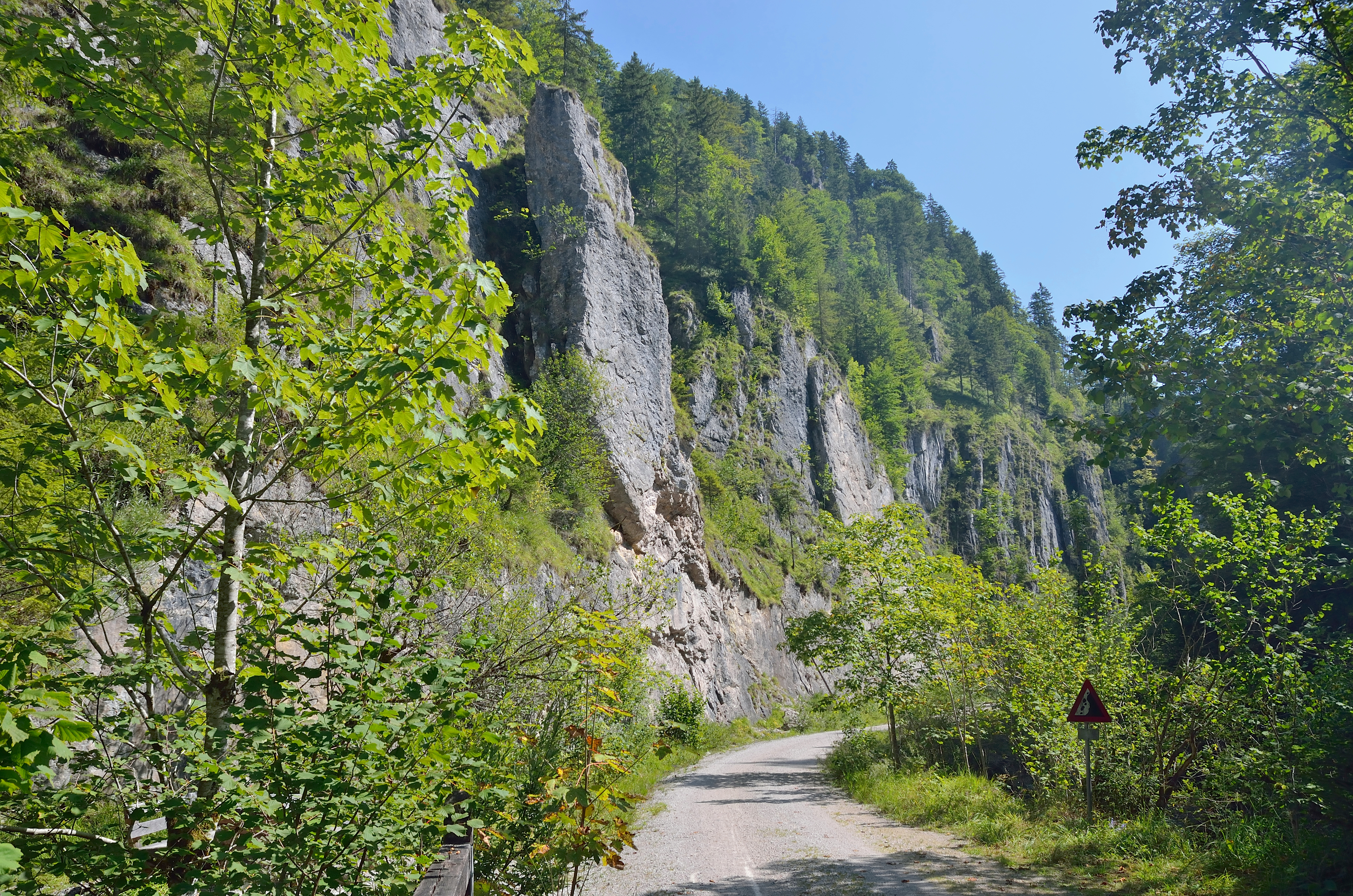 Die ehemalige Trasse der Waldbahn wird heute als Wander- und Radweg genutzt. Blick talaufwärts beim Schleierfall.